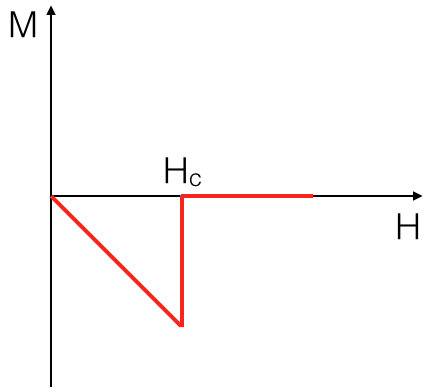 第一类超导体M(H) 制作者 zzxiaoquan